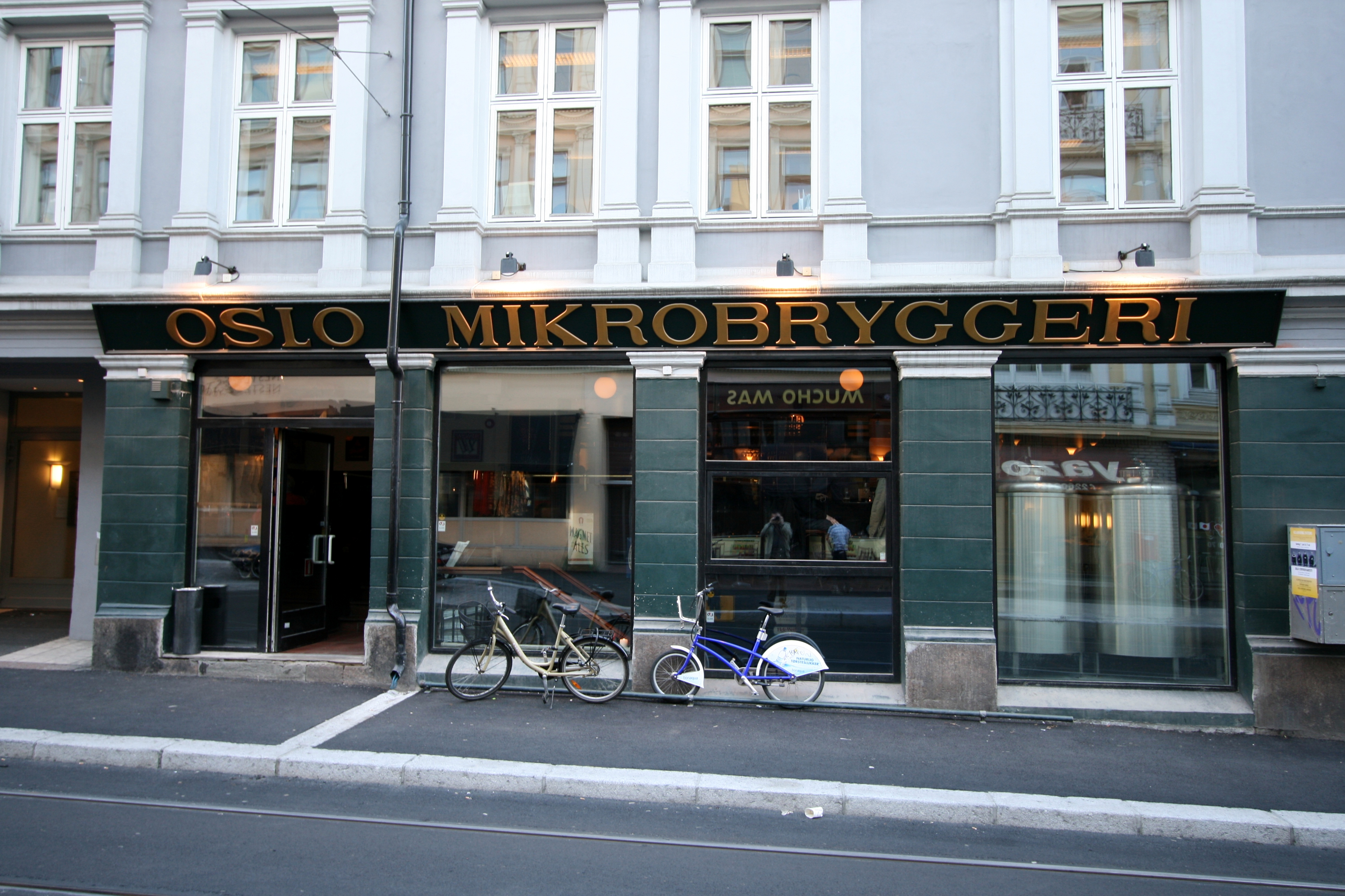 Oslo Mikrobryggeri i Holtegata i Homansbyen i Oslo.